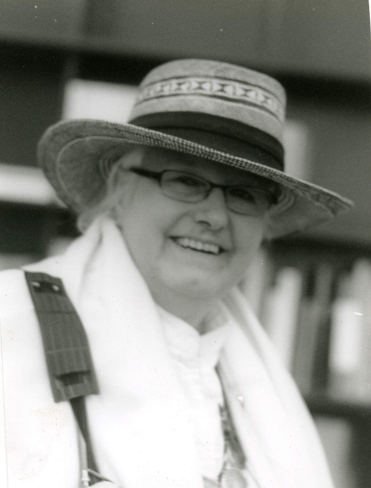 Portrait Suzanne Baumann 2006